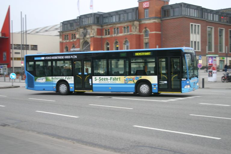 Bus der VKP in Kiel